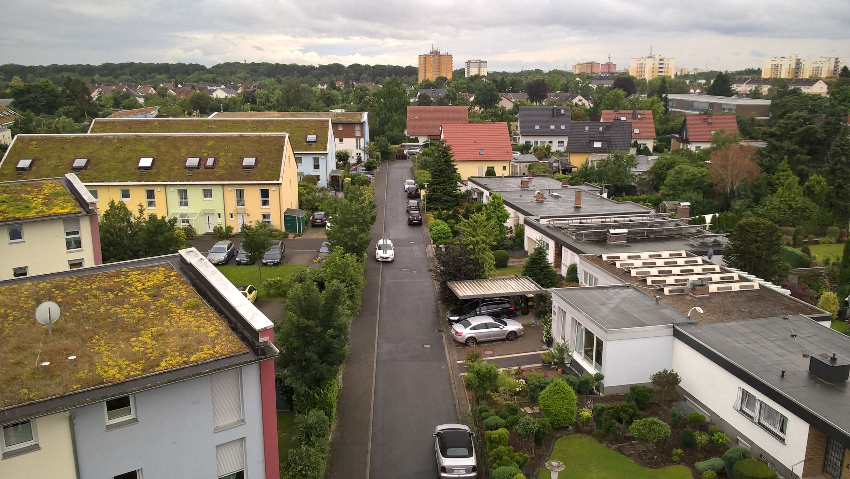 Max-Beckmann-Weg im Norden Haßlochs (Bild in südliche Richtung aufgenommen)